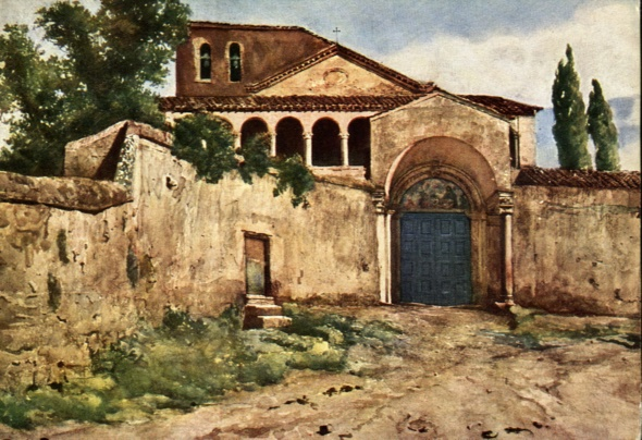 Chiesa di San Saba in Rome (rione San Saba)